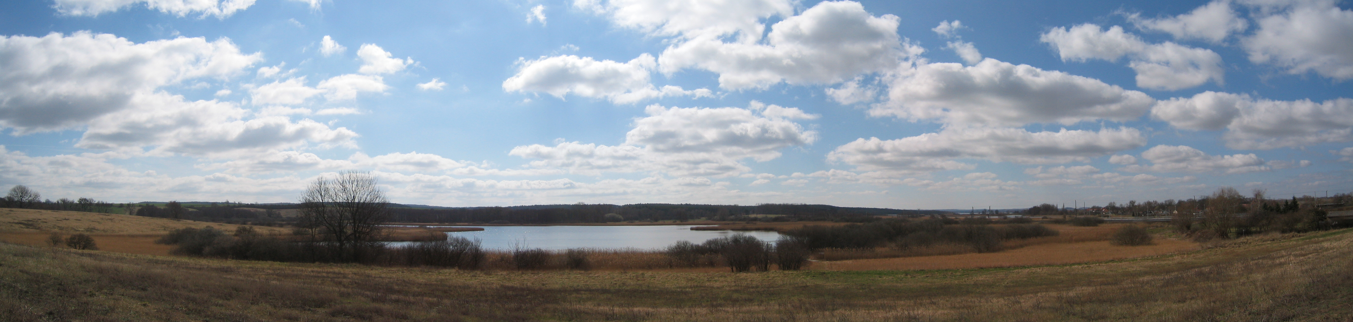 Der Krummesee in Seehausen (Uckermark)